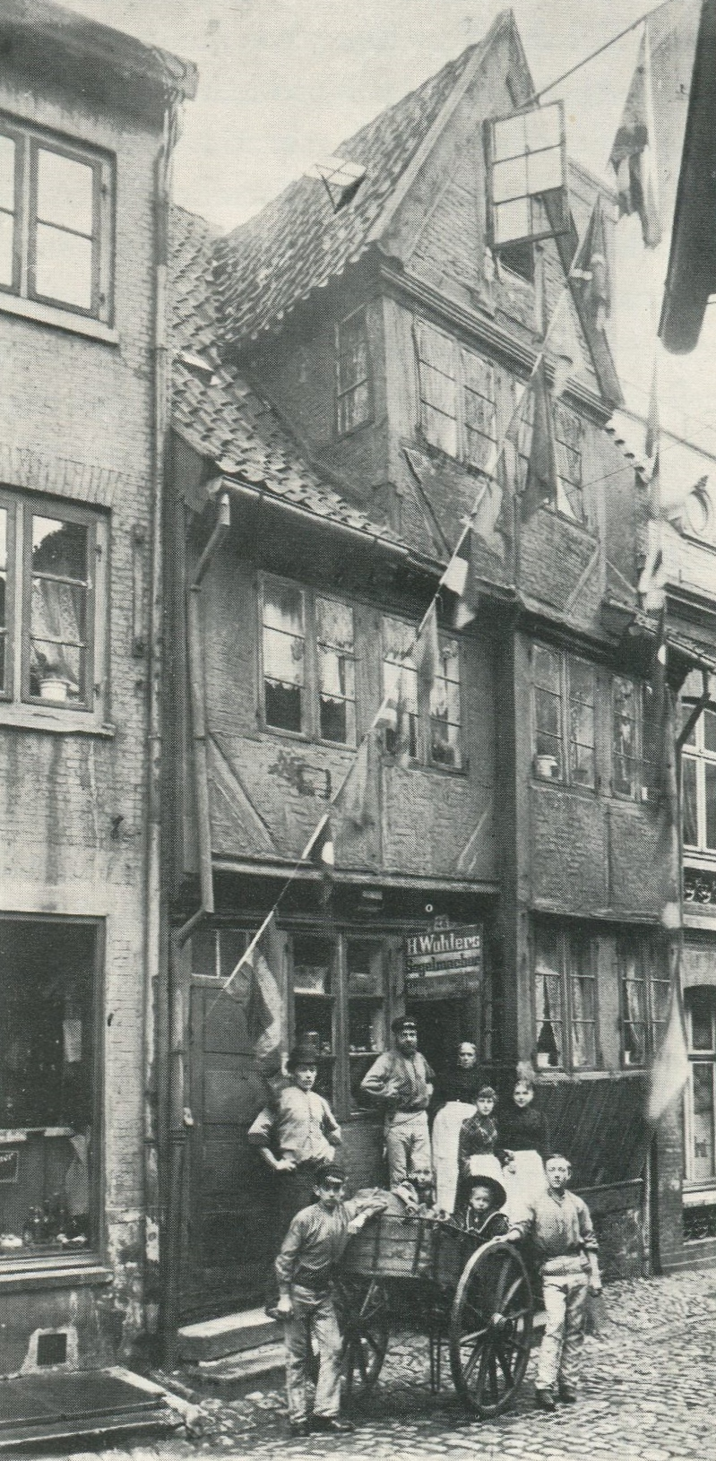 Segelmacherei in der (heute nicht mehr vorhandenen) Seestermannstraße in Altona 1890